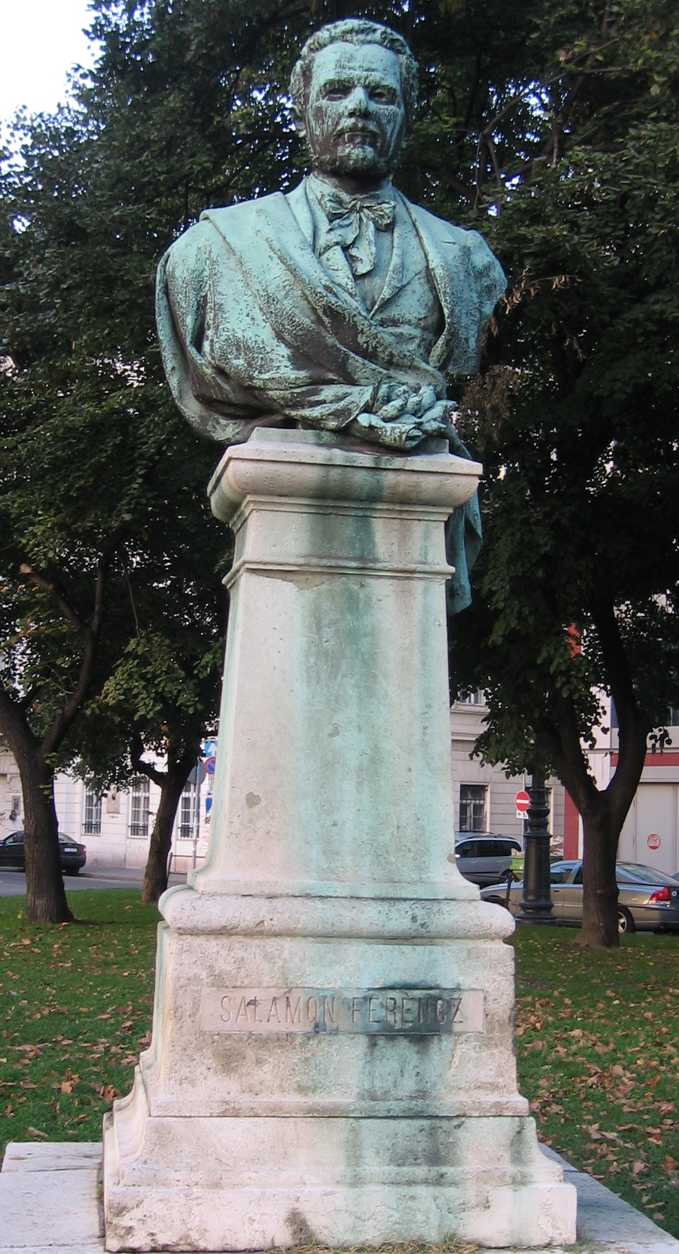 Salamon Ferenc, 19. századi irodalomkritikus, történész budapesti szobra. Jankovits Gyula alkotása (1902). A képet én készítettem.